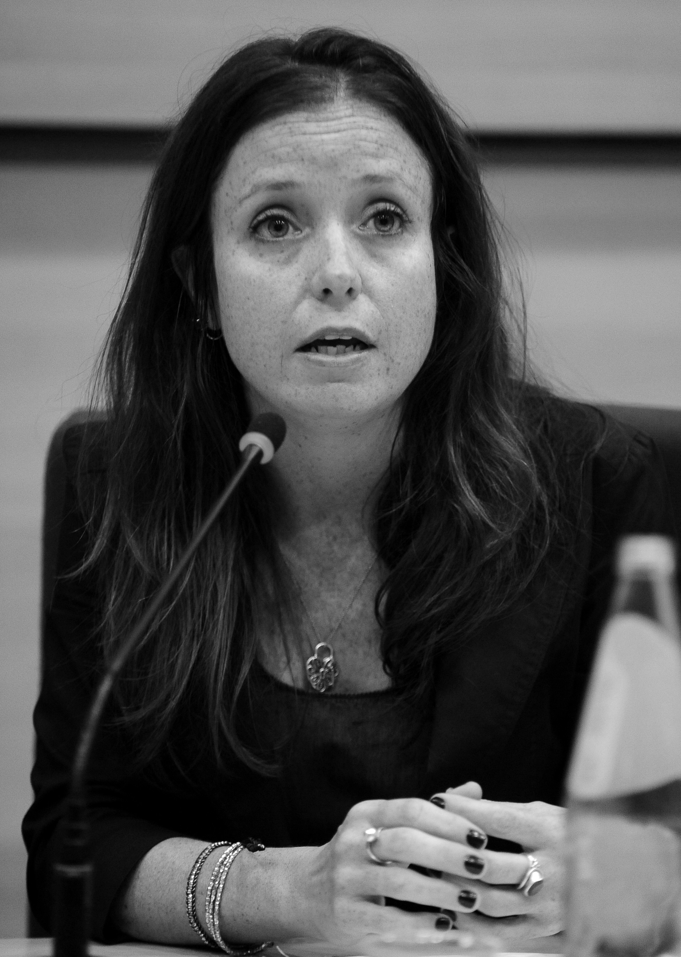 Danielle Nierenberg al Festivaletteratura 2012.